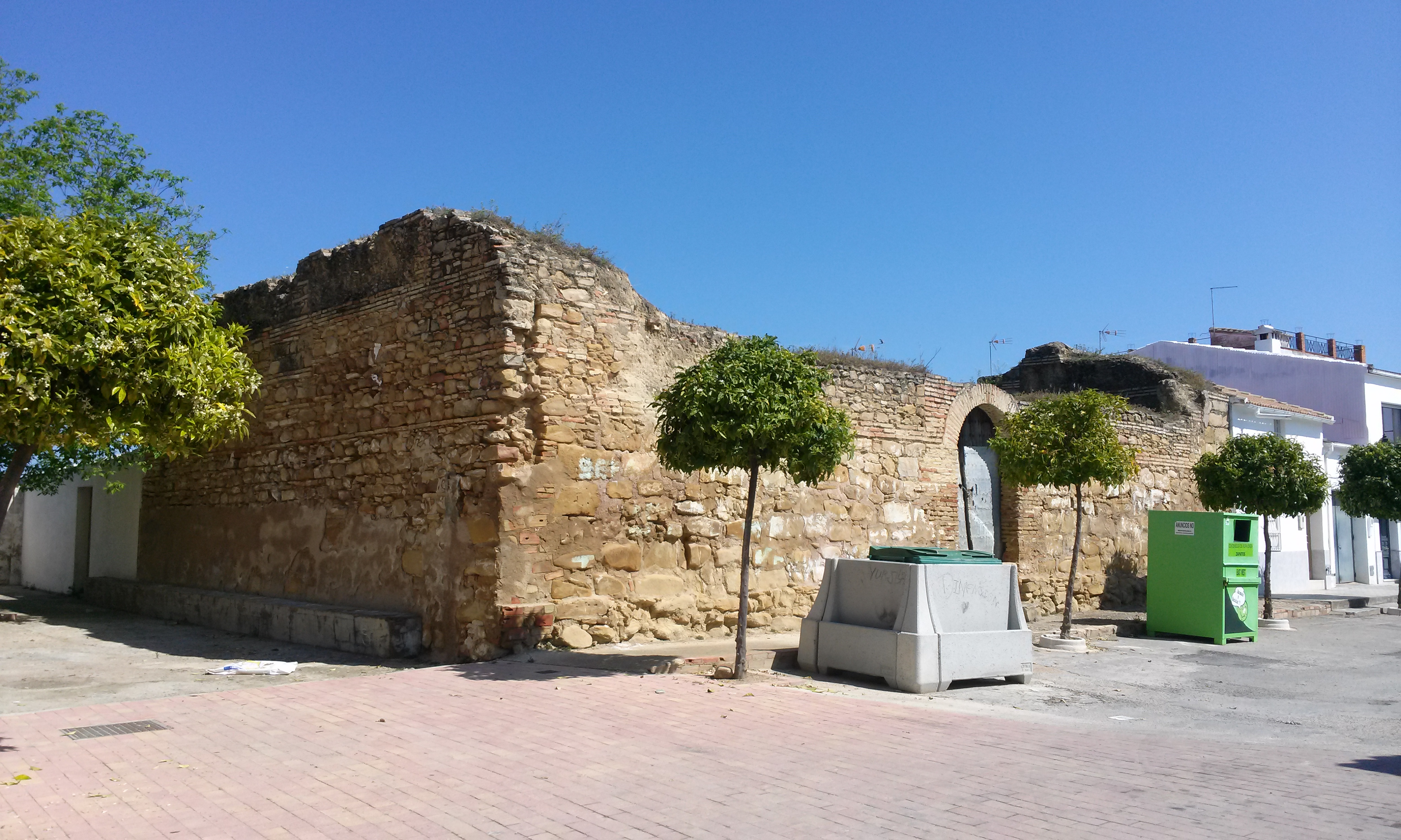 Torreón de la Tercia, Lahiguera, Jaén.